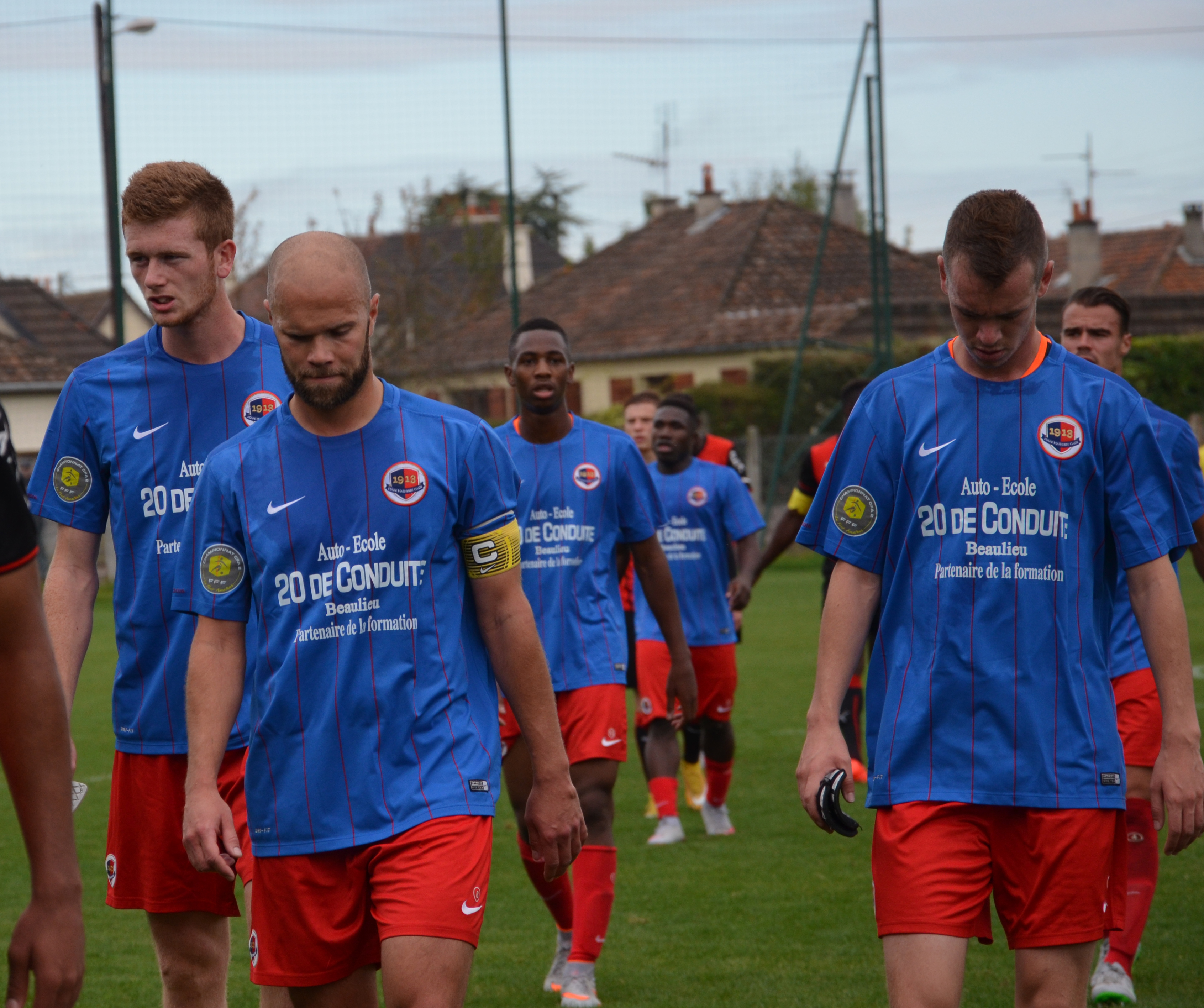 Photographie prise lors d'un match amical opposant les équipes réserves du Stade Malherbe de Caen et du Stade rennais sur l'un des terrains annexes du stade de Venoix le 13 septembre 2015. Ici, Florian Le Joncour, Alexandre Raineau et Jonathan Beaulieu.